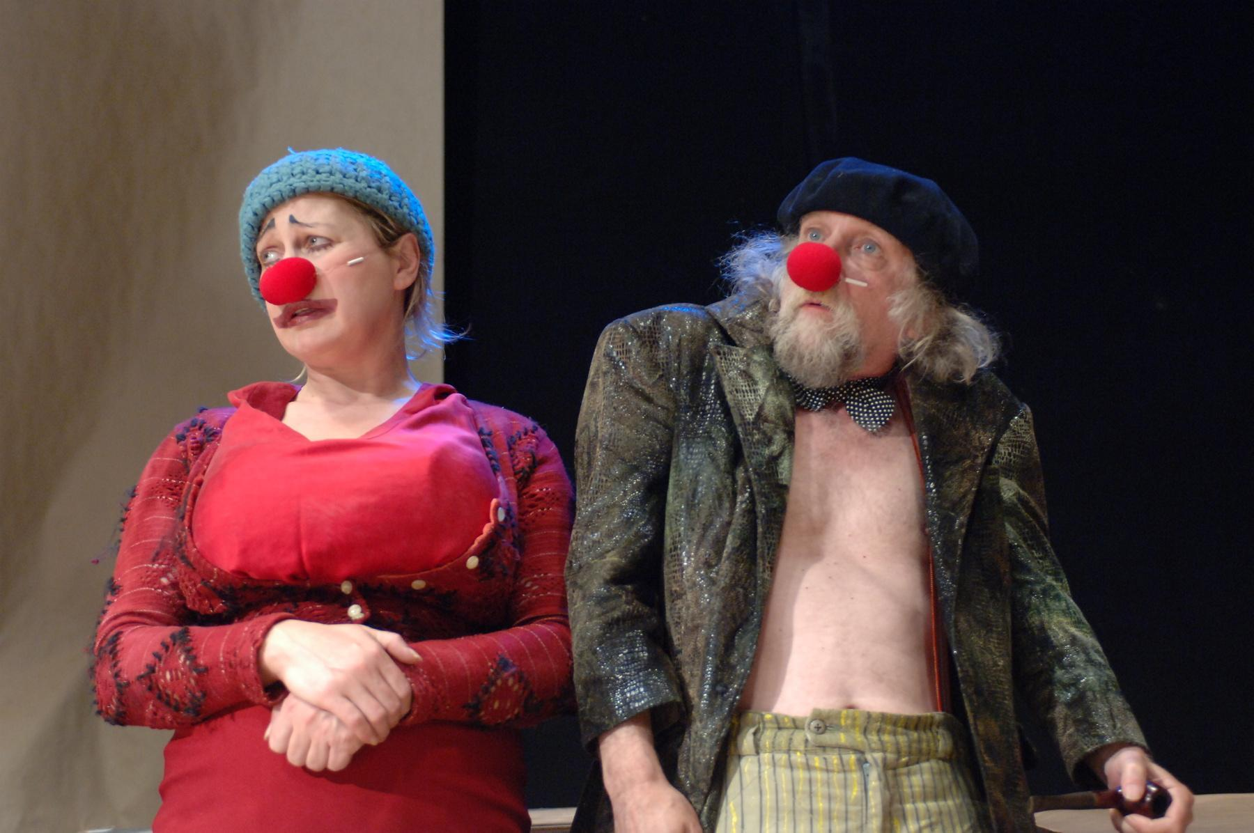 נטשה מנור ארבע